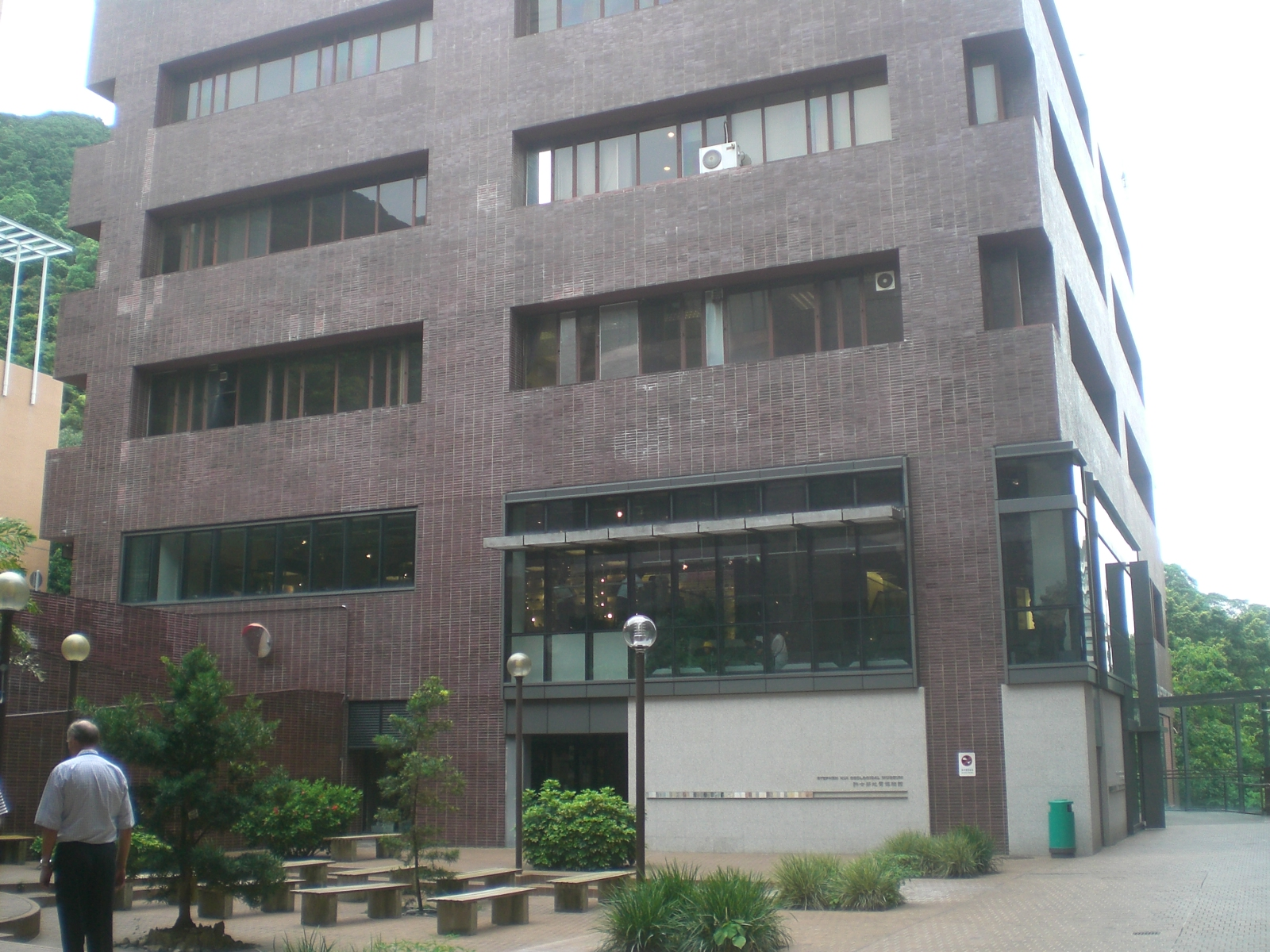 香港大學 厲樹雄科學館 香港大學許士芬地質博物館